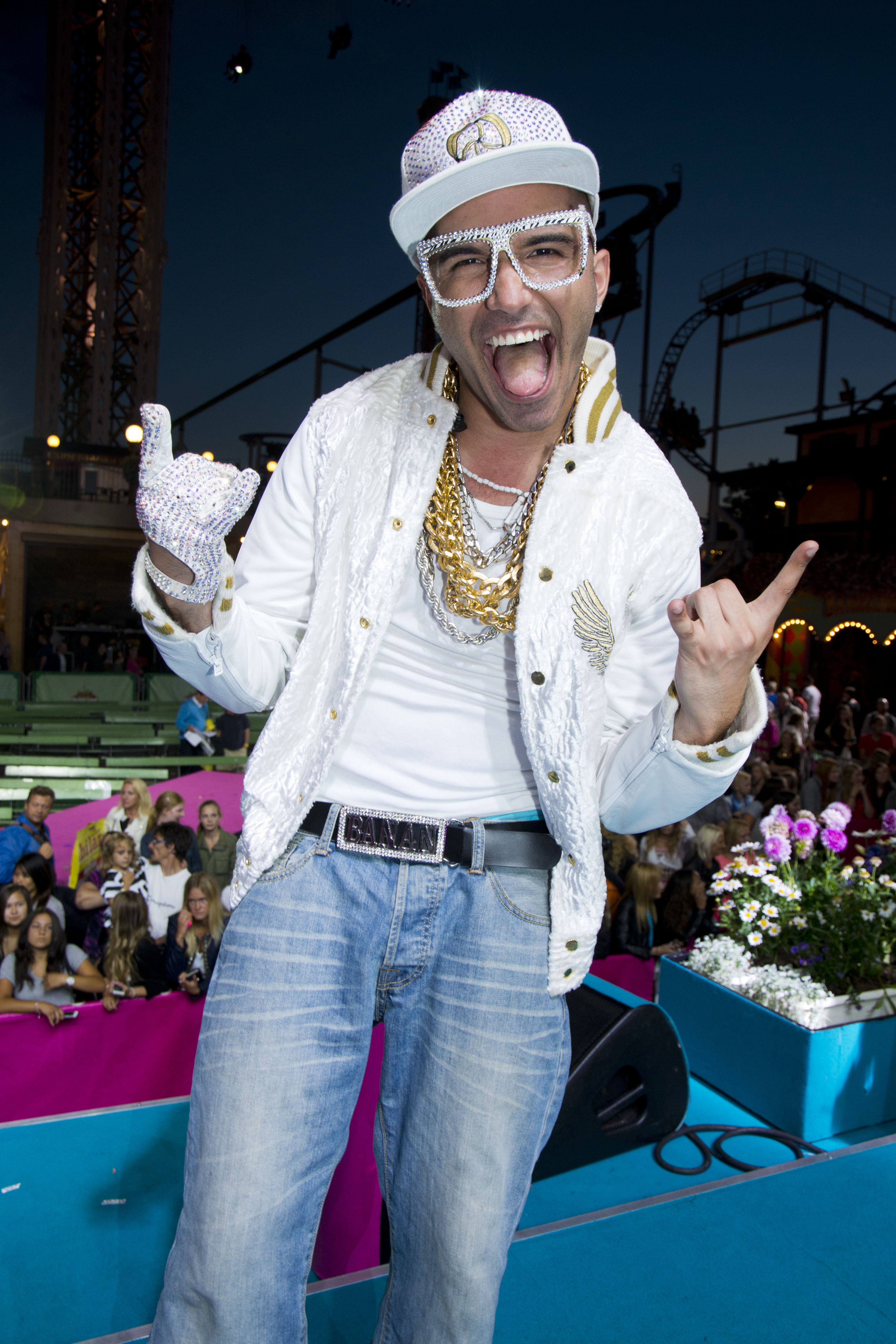 Sean Banan på Sommarkrysset, Gröna Lund